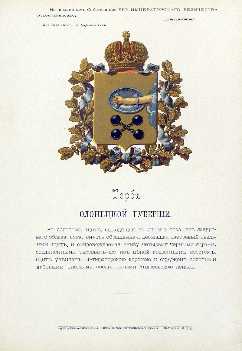 Official Russian Empire coat of arms Olonets Governorate. Герб Российской Империи Олонецкой губернии с официальным описанием в Гербовнике Бенке. Утверждён Императором Всероссийским Александром Вторым в 1878 году.